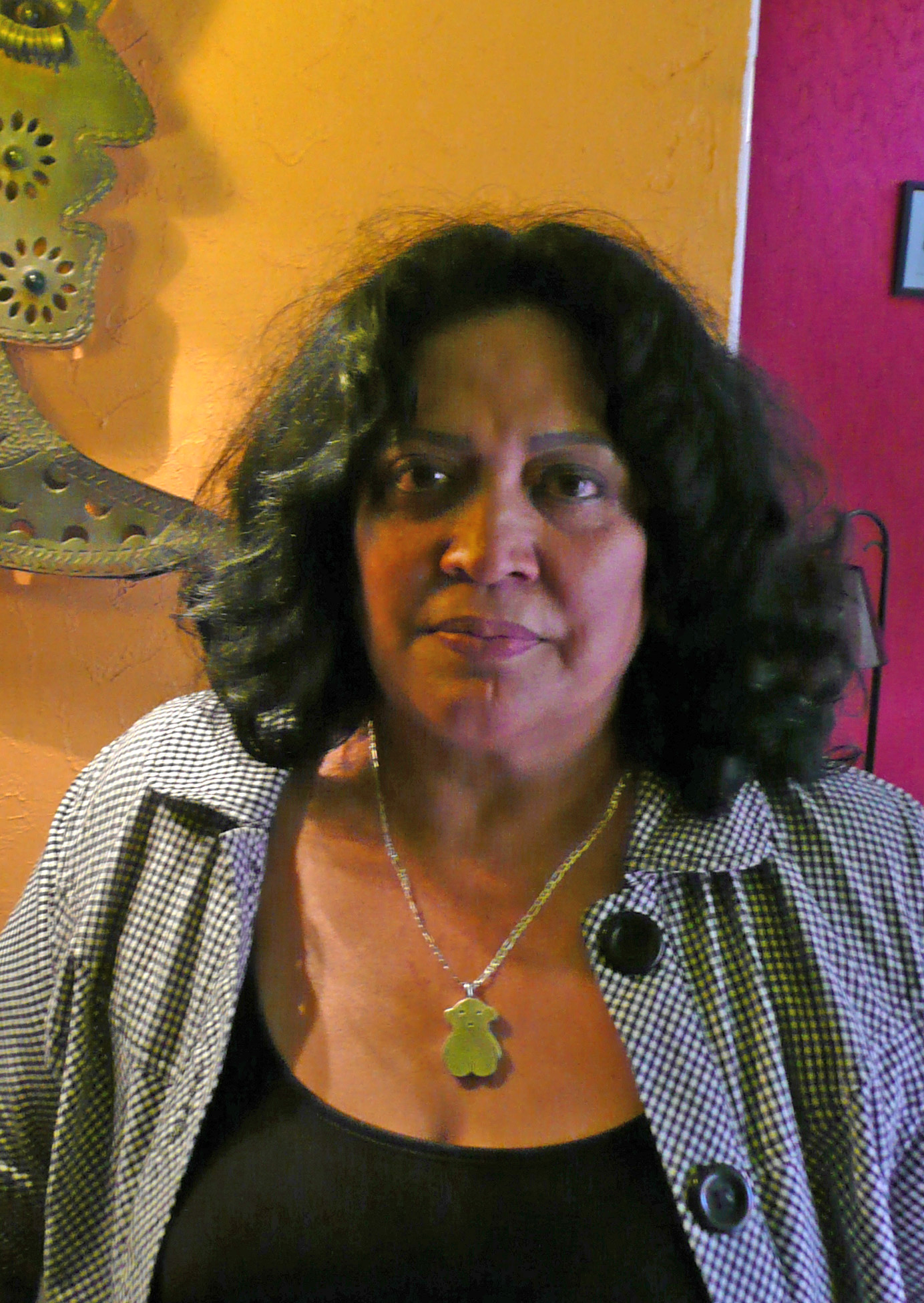 Marisela Ortiz, co-creadora de la organisacion Nuestras Hijas de Regreso en Casa, luchadora social contra las desapariciones de mujeres en Ciudad Juarez, México, y contre la impunidad que prevalece en esos casos.